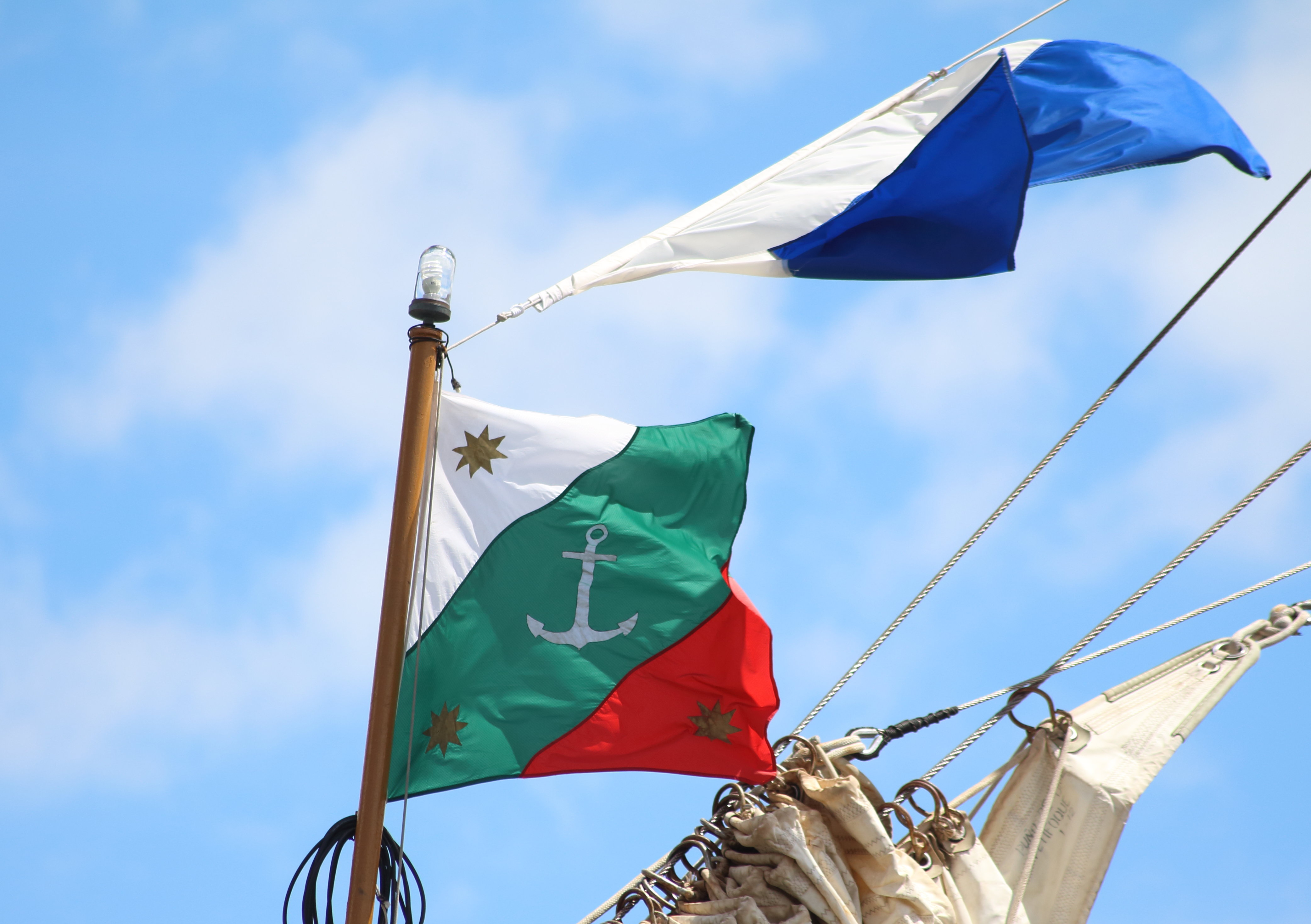 Pavillon de beaupré du Cuauhtémoc (marine mexicaine) à Brest 2016.